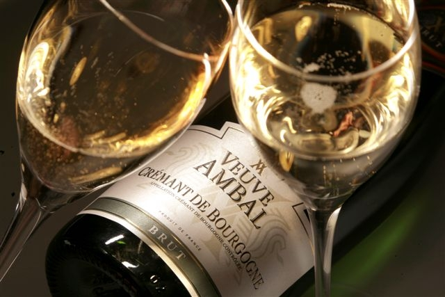 brut veuve ambal